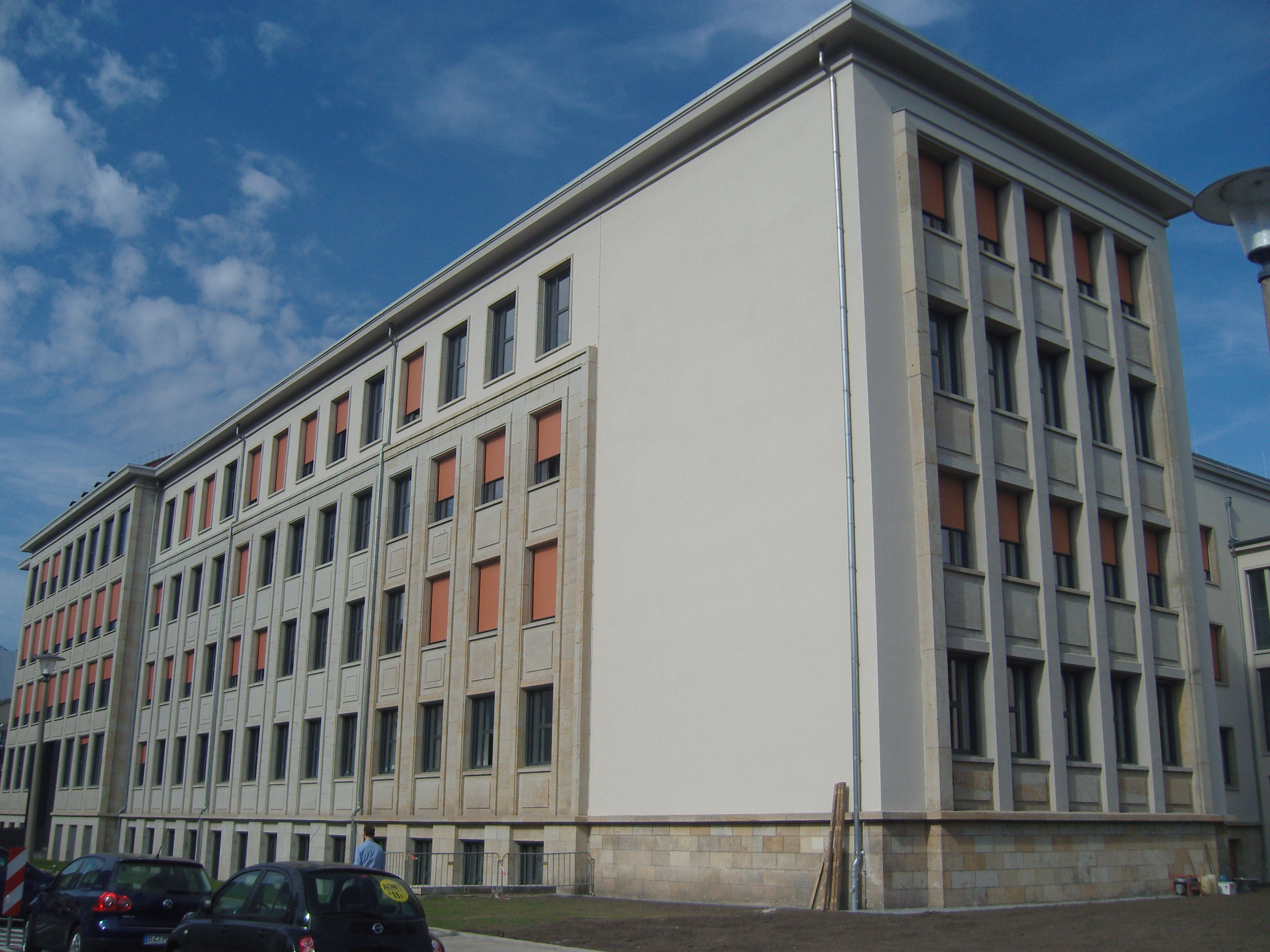 Evangelische Hochschule für Soziale Arbeit in Dresden